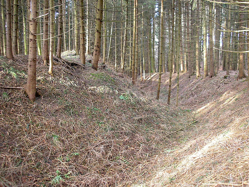 Frühmittelalterlicher Ringwall Walleshausen (Gemeinde Geltendorf, Landkreis Landsberg am Lech, Oberbayern). Der Wallgraben nach Norden. Eigene Aufnahme, Feb. 2008 / Early Middle Ages ringwork castle Walleshausen near Geltendorf (Upper Bavaria, Germany). The earthworks, looking north. Own photo, Feb. 2008